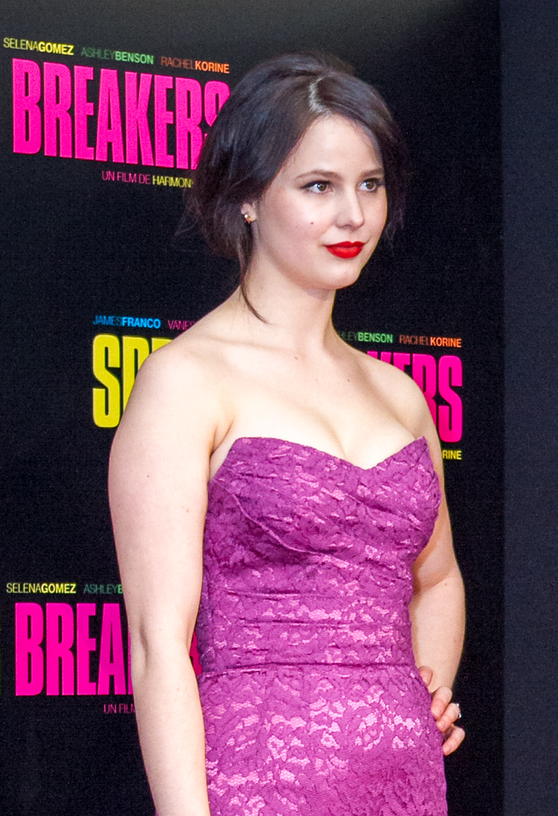 Rachel Korine lors de l'avant-première de Spring Breakers, sur le photocall du Grand REX